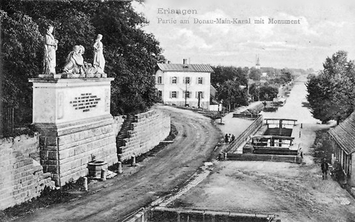 Ludwig-Donau-Main-Kanal, Schleuse 89, Erlangen